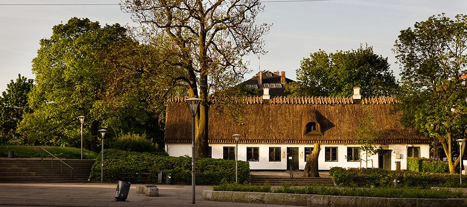 Brønshøj Rytterskole in Brønshøj, Copenhagen, Denmark